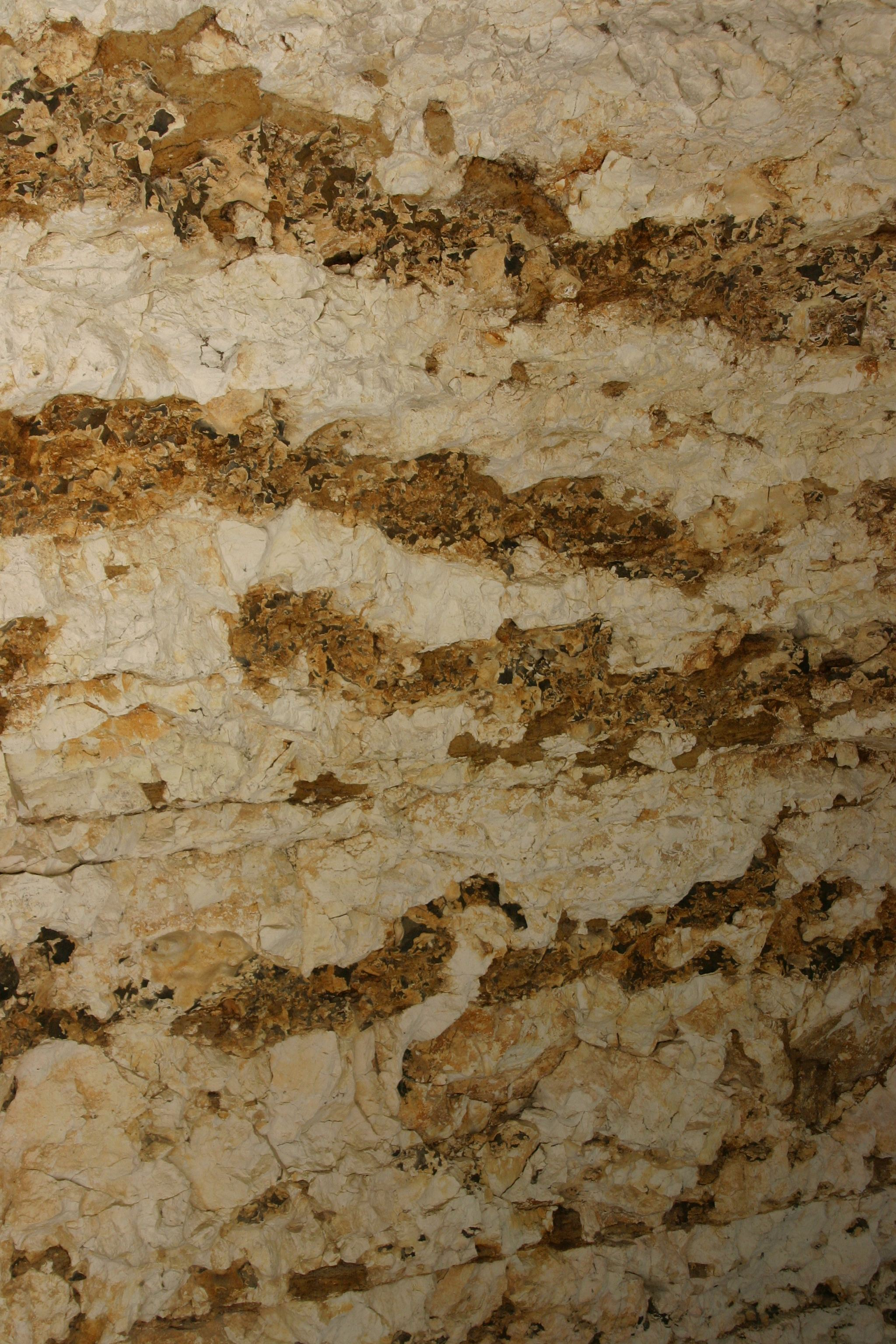 inclusions de couches de silex dans un sol calcaire